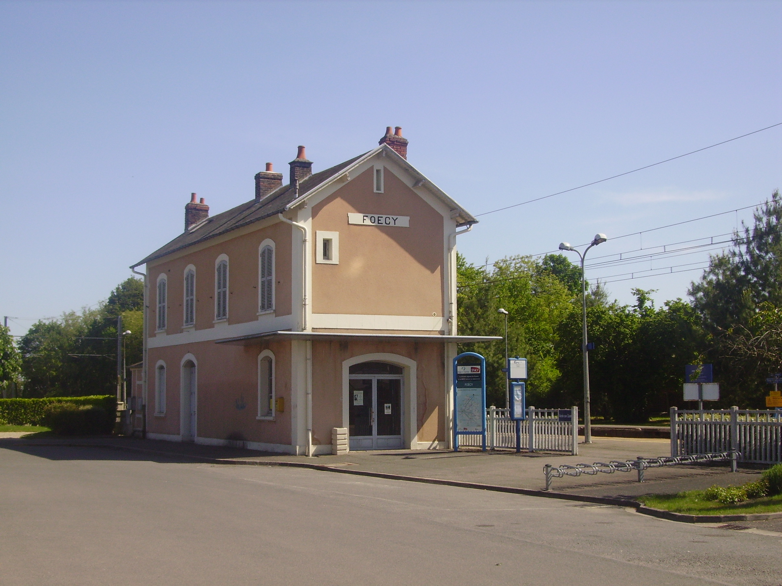 Gare de Foëcy (Cher)